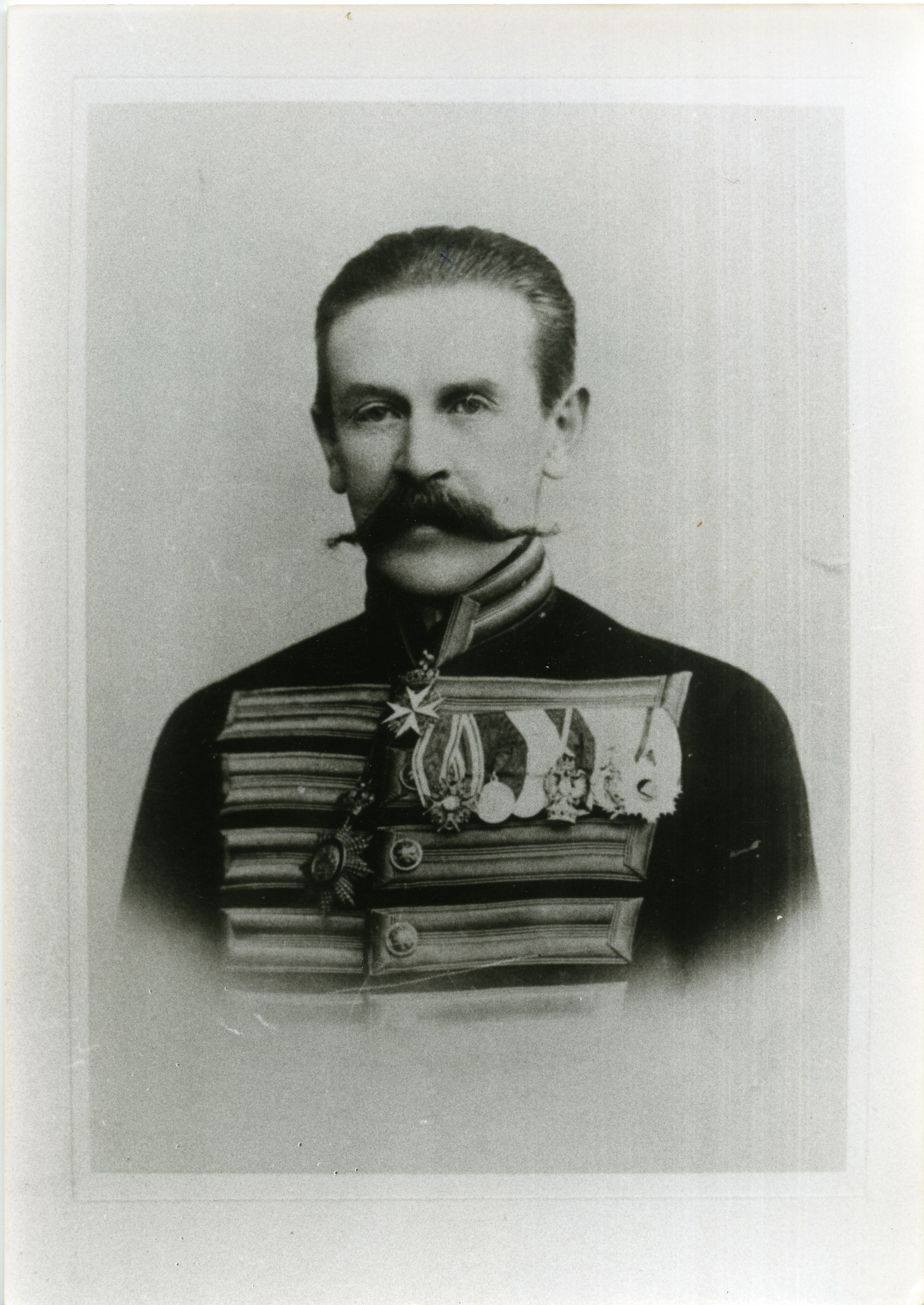 Saaremaa maamarssal, Kuivastu, Võlla, Pädaste, Võhksa ja Haimre mõisnik